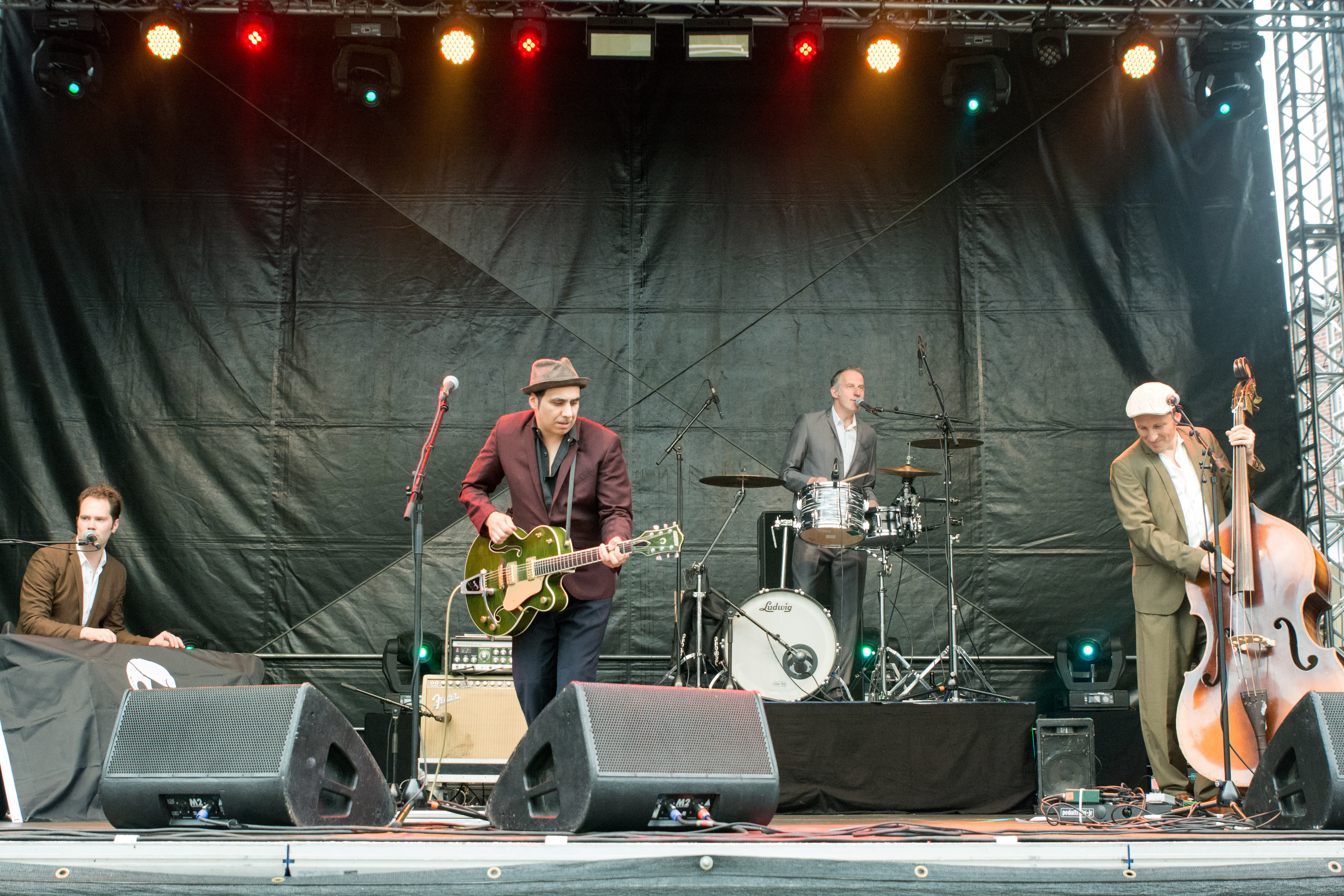 The Backbeats beim Holsten Brauereifest 2016